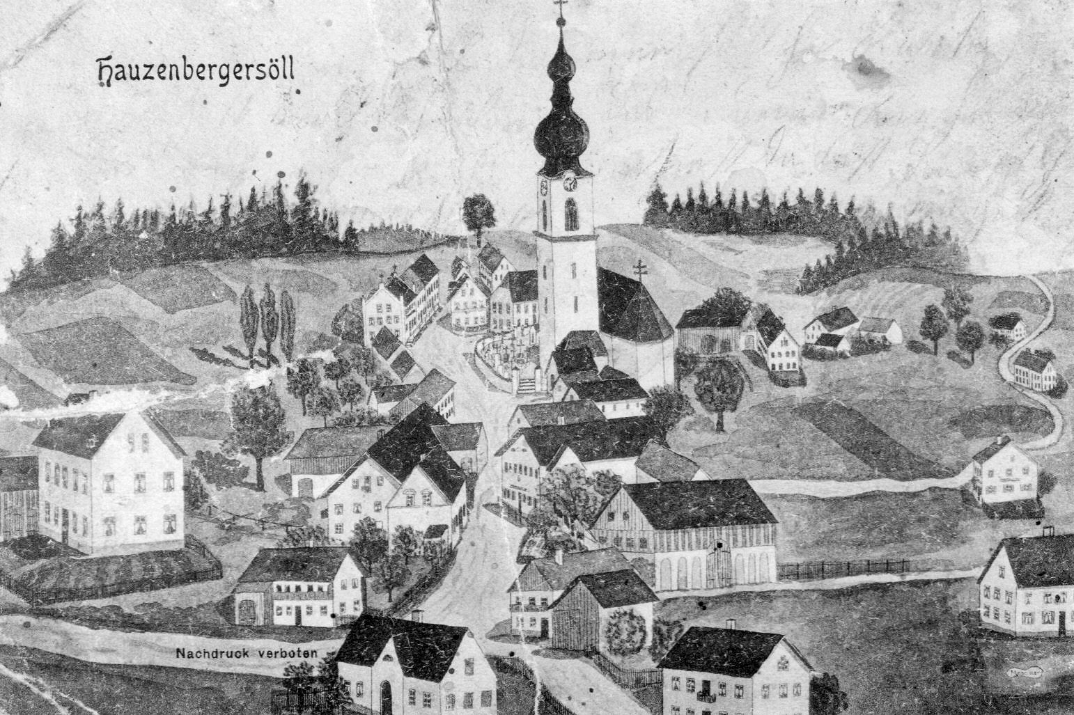 Haunzenbergersöll 1904 Kirche Dorf Straße Häuser Ansichtskarte Postkarte Zeichnung